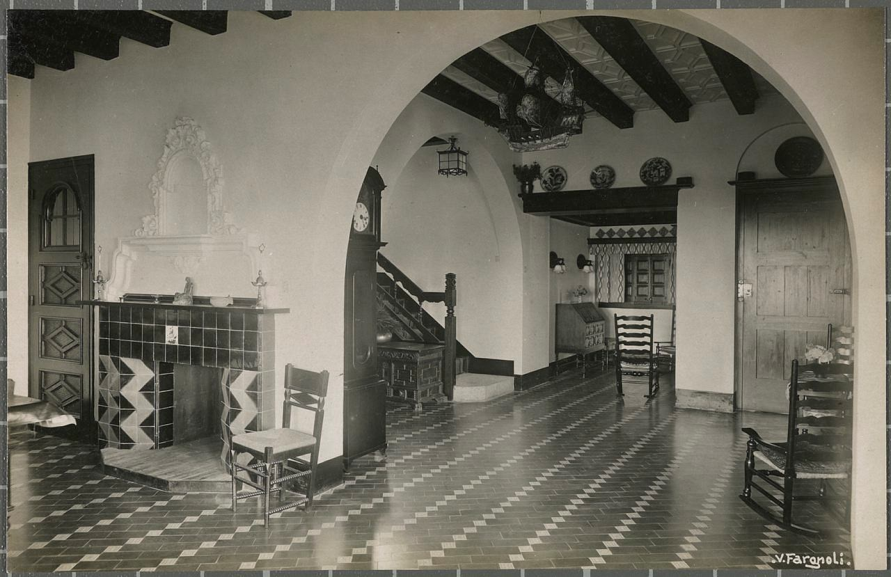 Interior del xalet Senya Blanca (S'Agaró) dissenyat per l'arquitecte Rafael Masó.